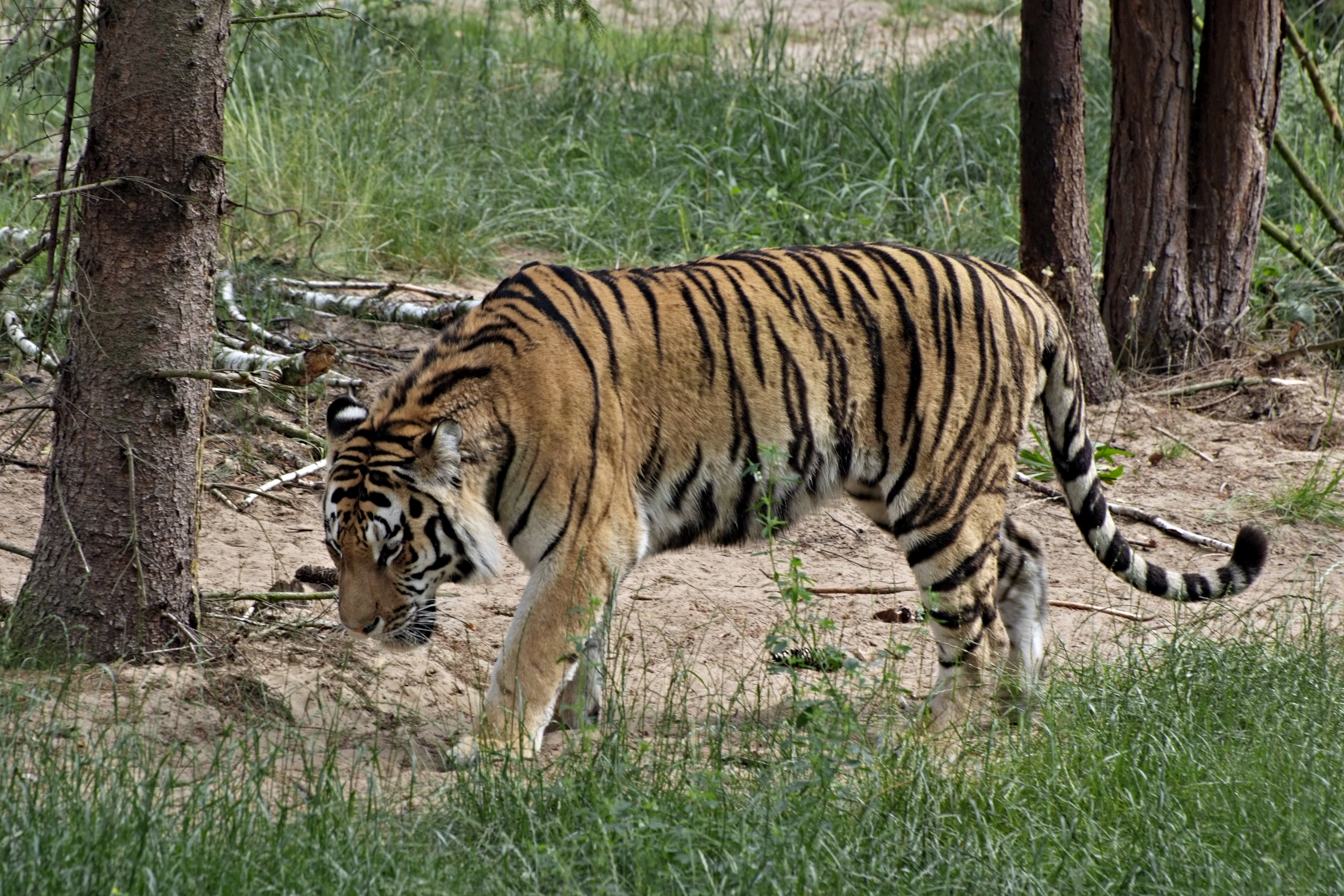 Sibirischer Tiger (P. tigris altaica) im Zoo Eberswalde